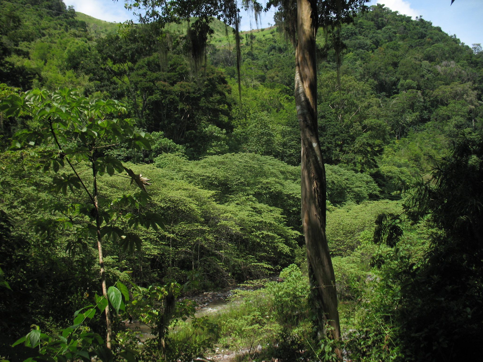 Montañas de la Sierra de Agalta, Olancho. Honduras. Photo by Dennis Garcia.